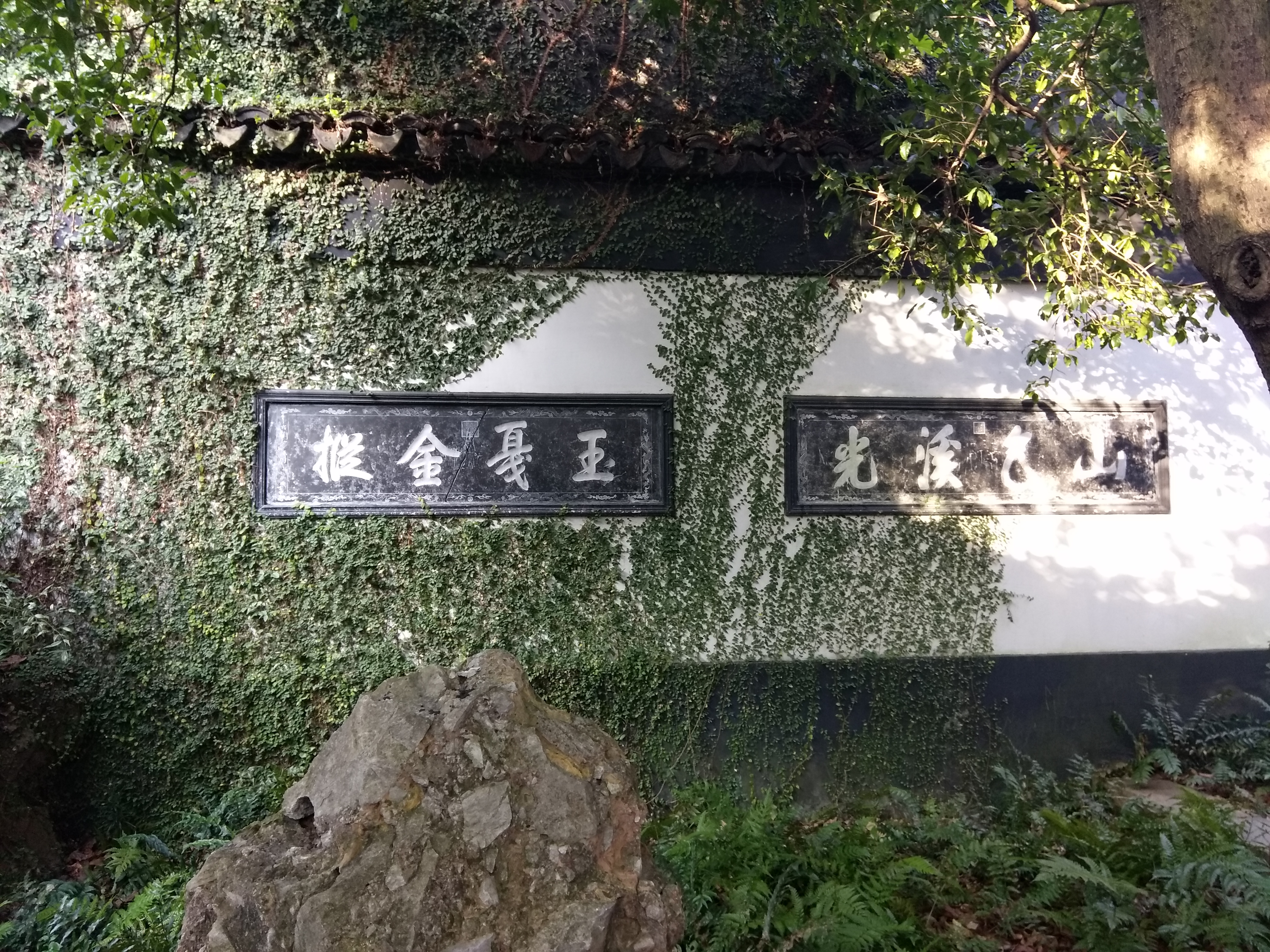 中文（中国大陆）: 寄畅园 皇帝的题字